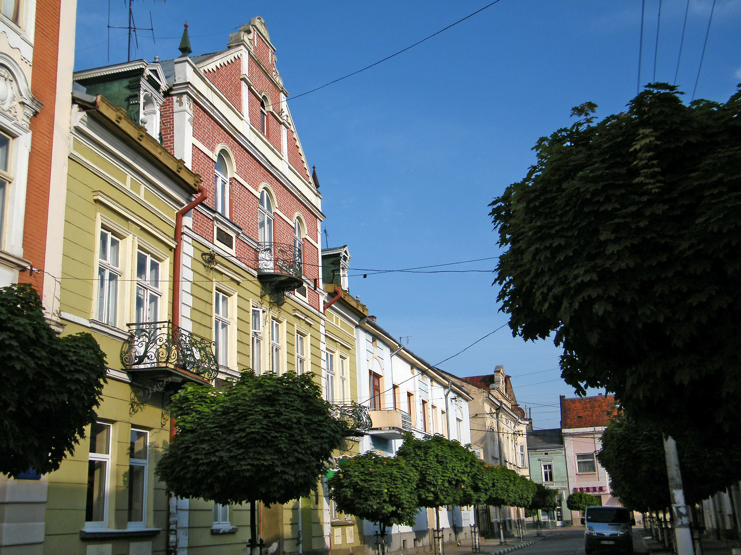 Вулиця Народна в Стрию